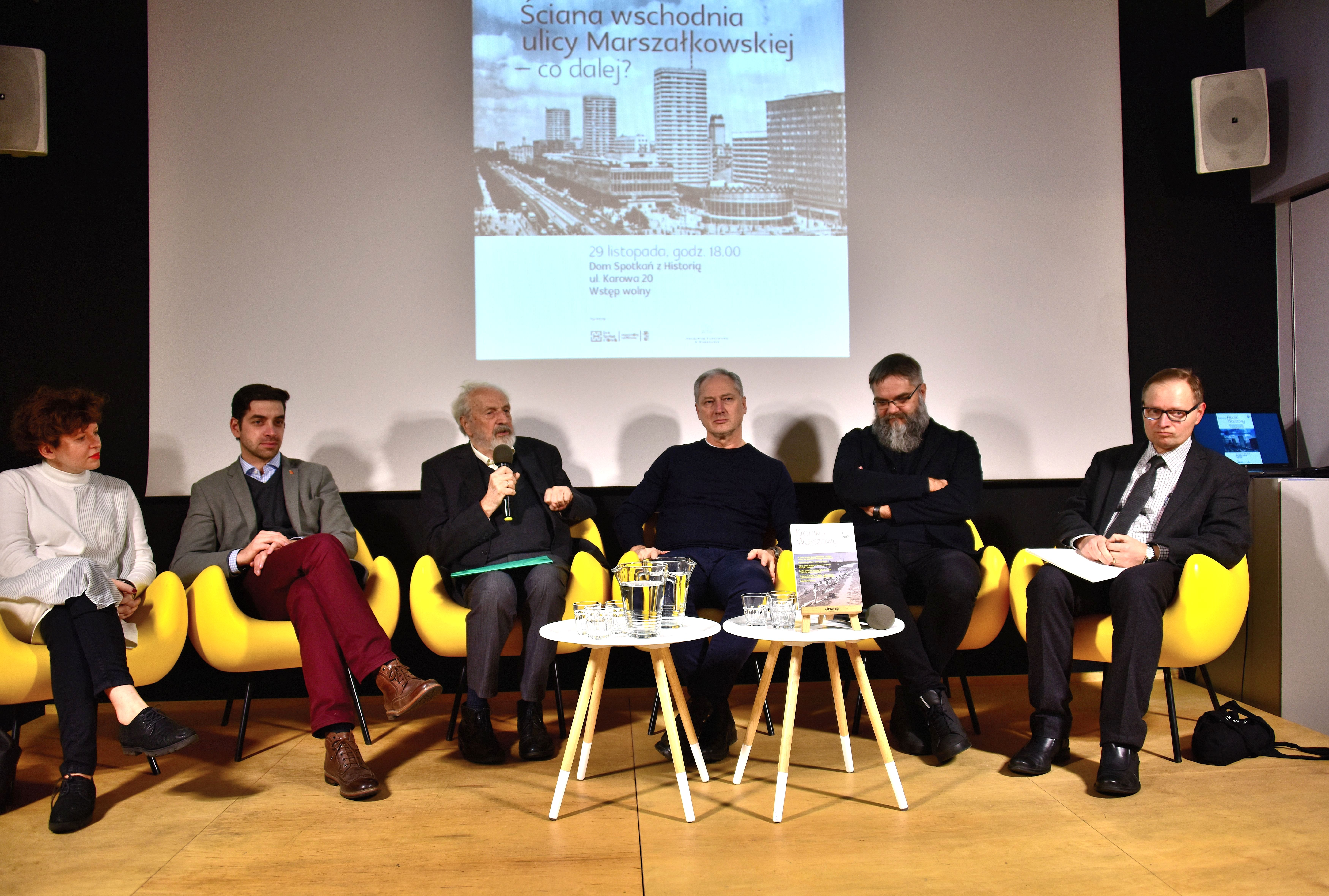 Debata "Kroniki Warszawy" Ściana Wschodnia ulicy Marszałkowskiej – co dalej? w Domu Spotkań z Historią w Warszawie. Siedzą od lewej: Marlena Happach, Michał Krasucki, Andrzej Kaliszewski, Henryk Łaguna, Dariusz Hyc i Tomasz Markiewicz